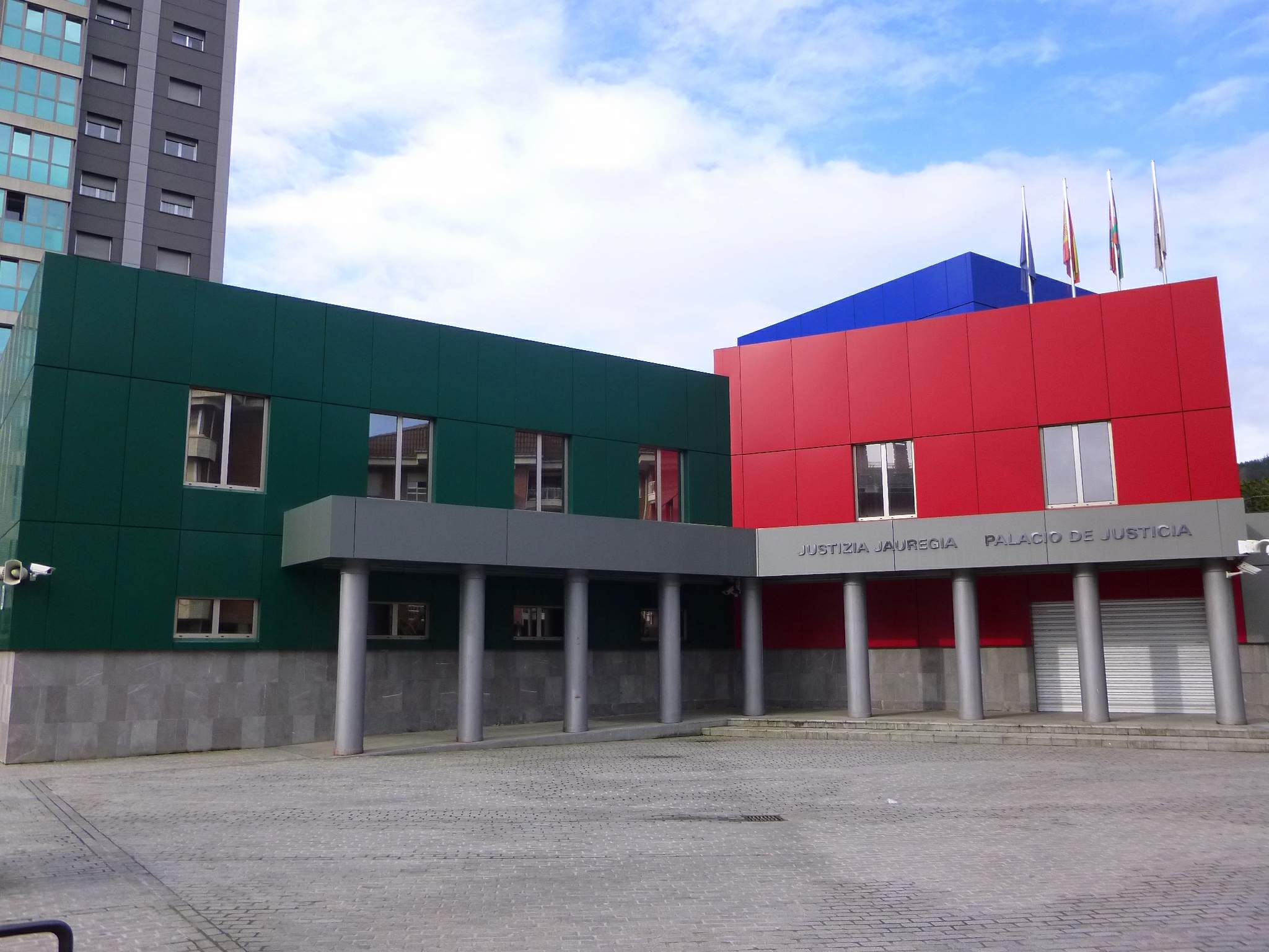 Palacio de Justicia/Justizia Jauregia (Azpeitia, Gipuzkoa)